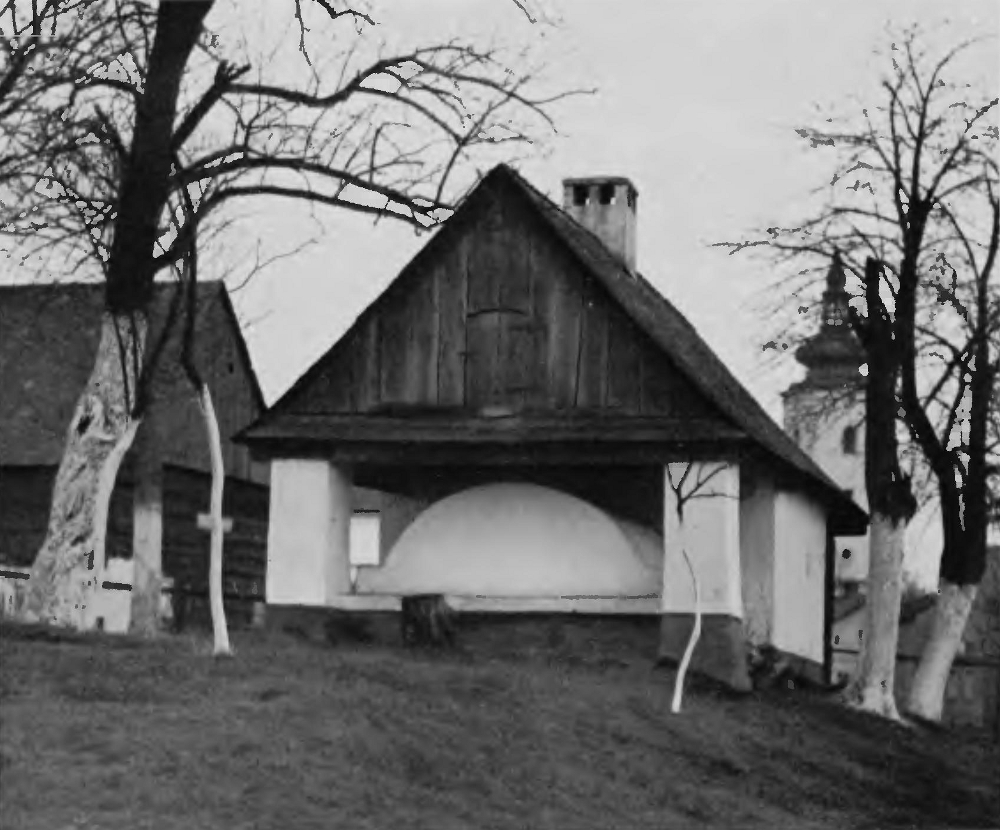 Backhaus in einem Bauerngarten in Rösnitz in Oberschlesien